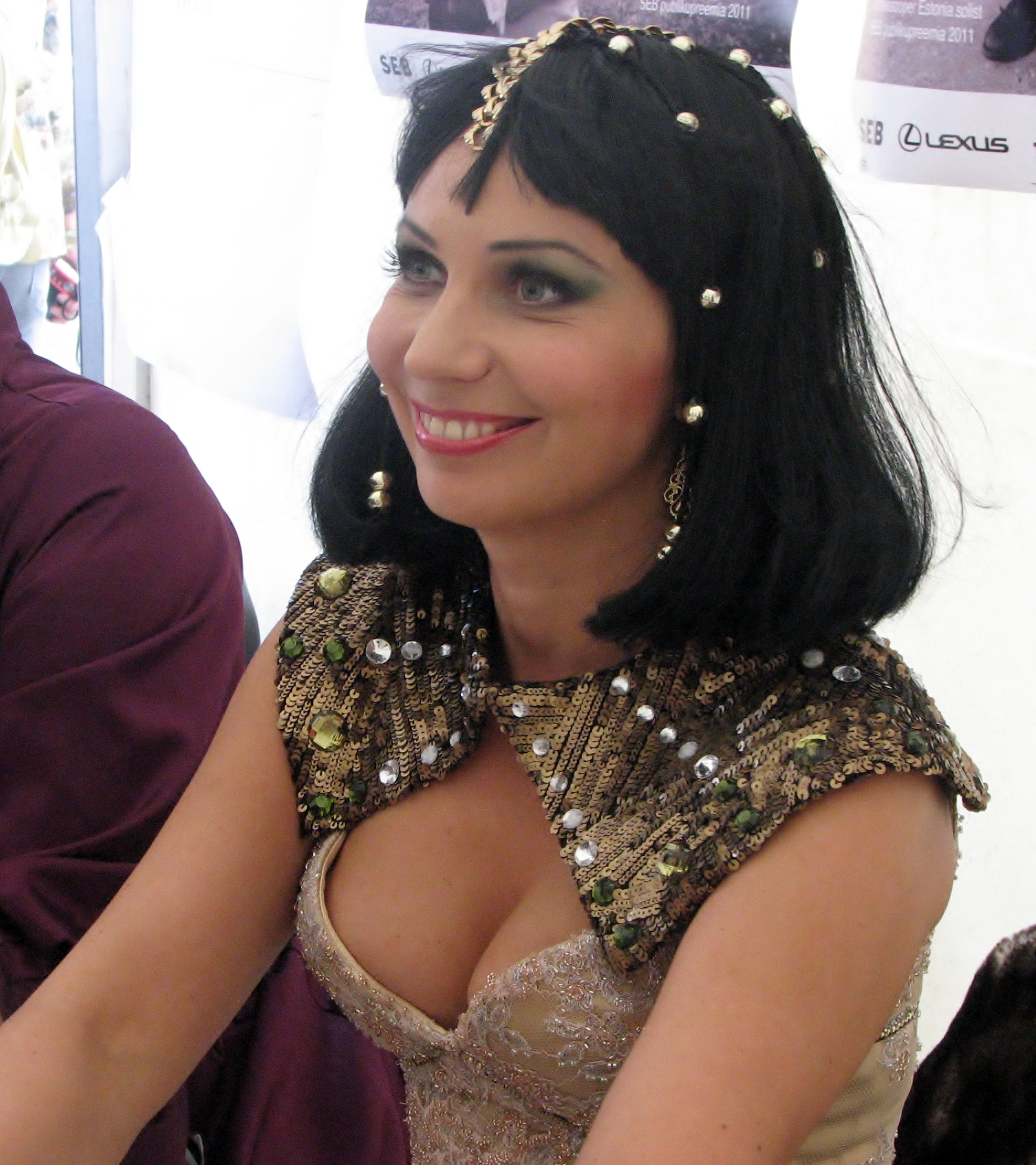 Helen Lokuta SEB publikupreemia laureaatide autogrammitunnis Rahvusooper Estonia 107. hooaja avamisel